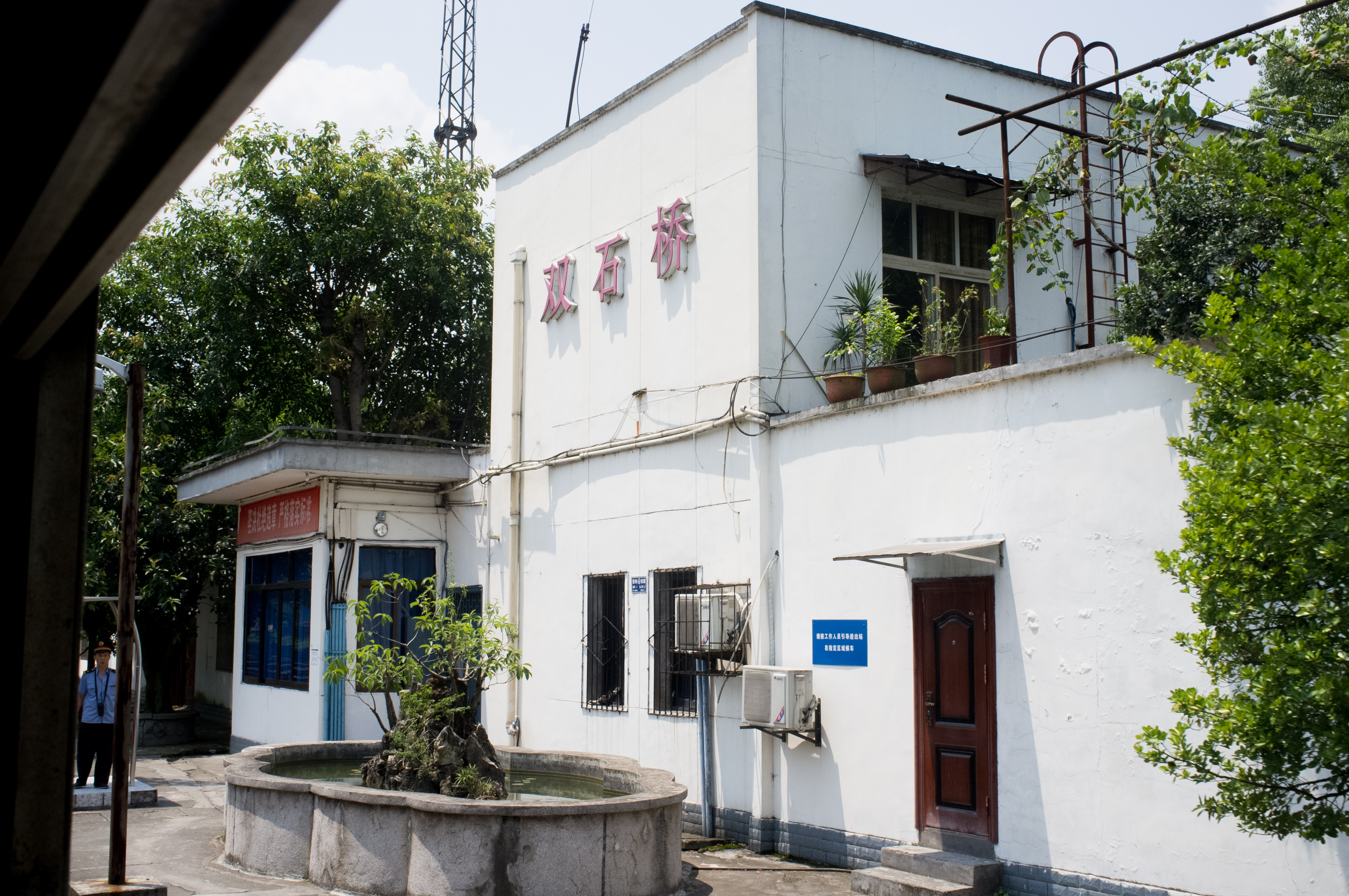 中文（中国大陆）: 成渝铁路双石桥站